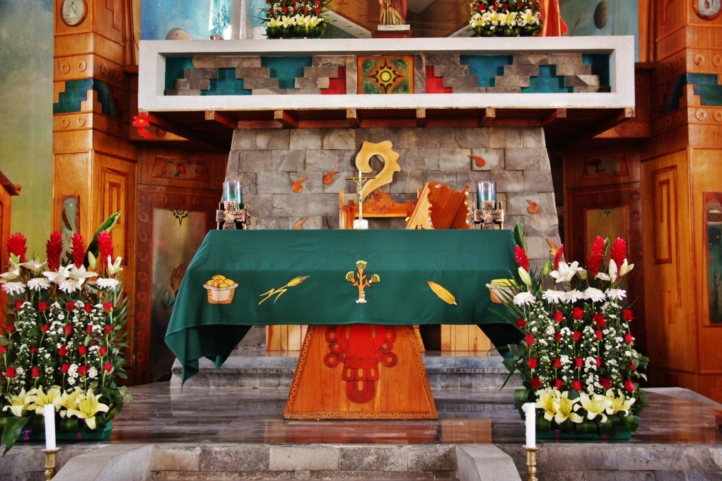 La Barca de la Fé, Templo Parroquial de San Andrés Buenavista, Tlaxco, Tlaxcala, México